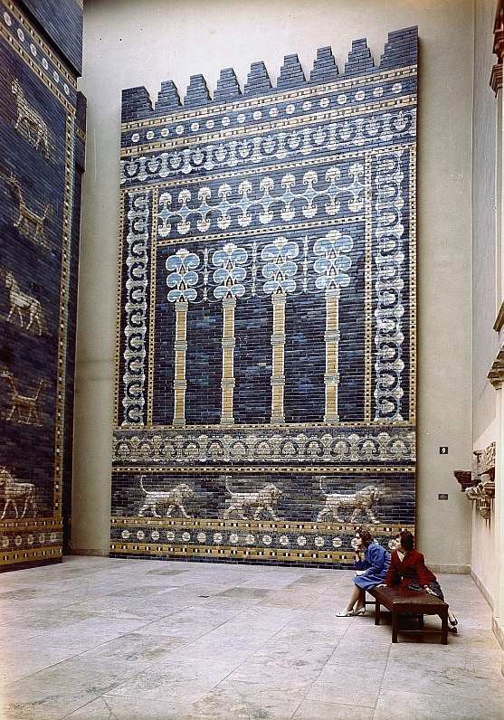 Original image description from the Deutsche Fotothek Berlin. Pergamonmuseum, Ischtar-Tor